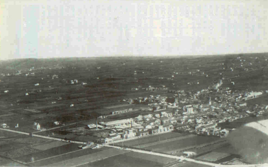 Vista aèria de Meliana des del sudoest.